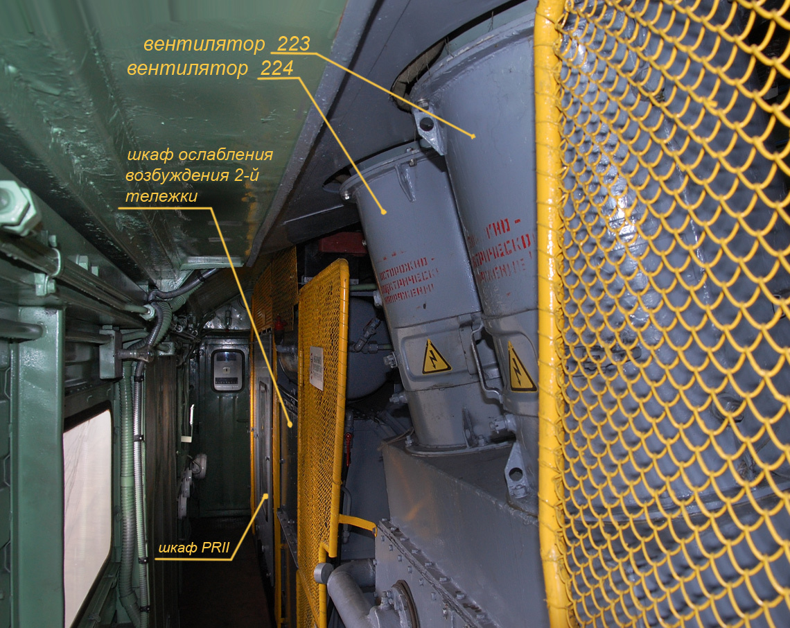 Продольный проход электровоза ЧС4, вид от тягового трансформатора ко второй кабине